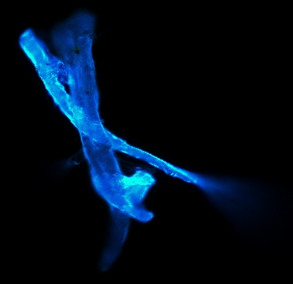 Fussel mit DAPI-Färbung, 400fache Vergrößerung, 340 nm Exzitationswellenlänge